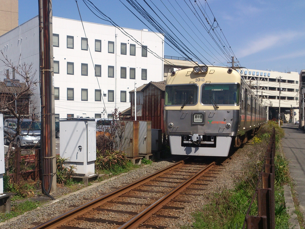 郡中線の電車です